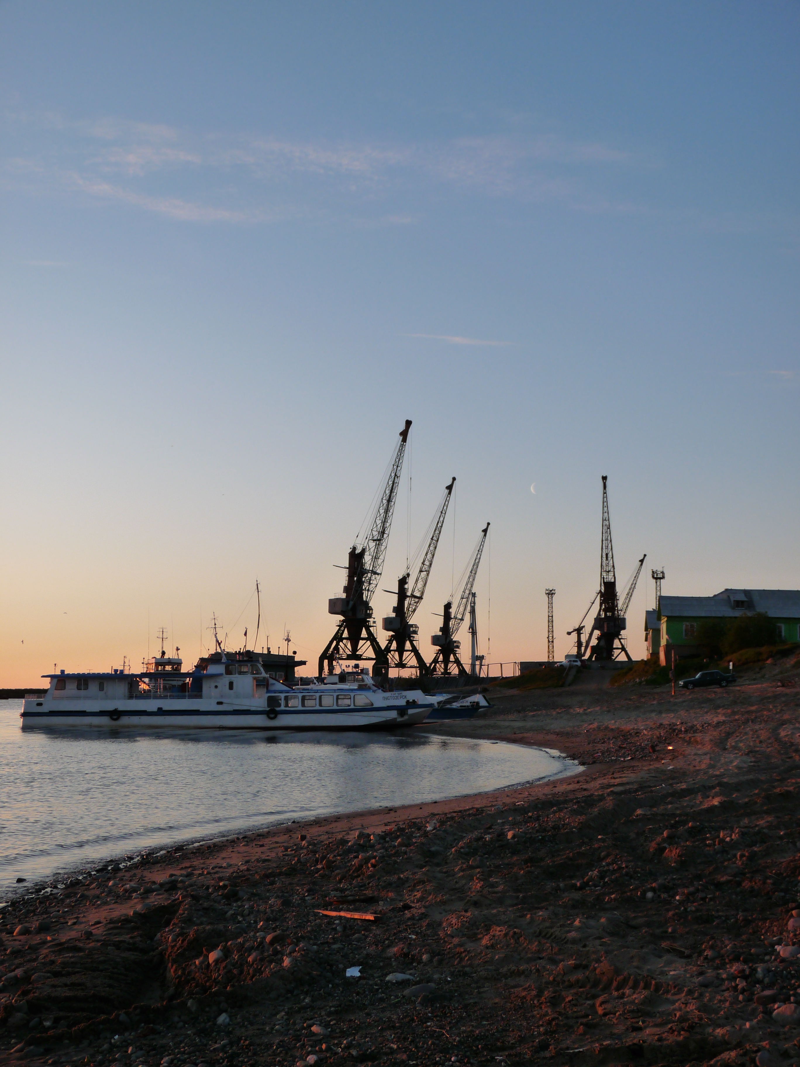 Морской порт Нарьян-Мара